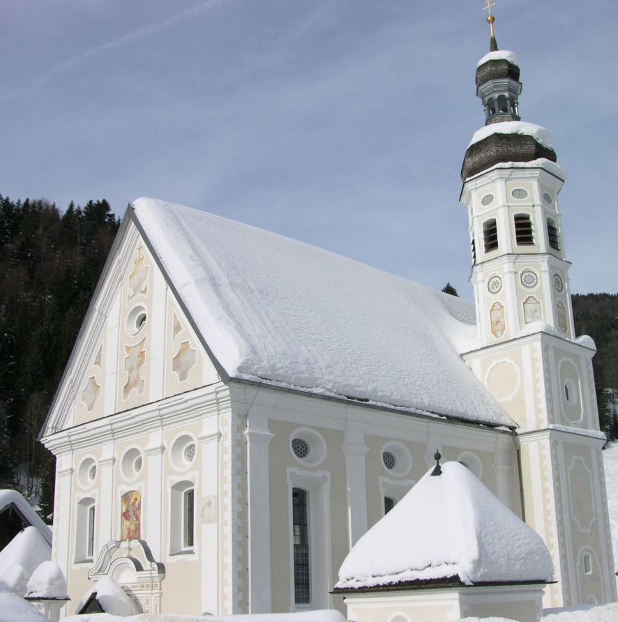 Kirche St. Michael in Sachrang (Deutschland, Bayern)